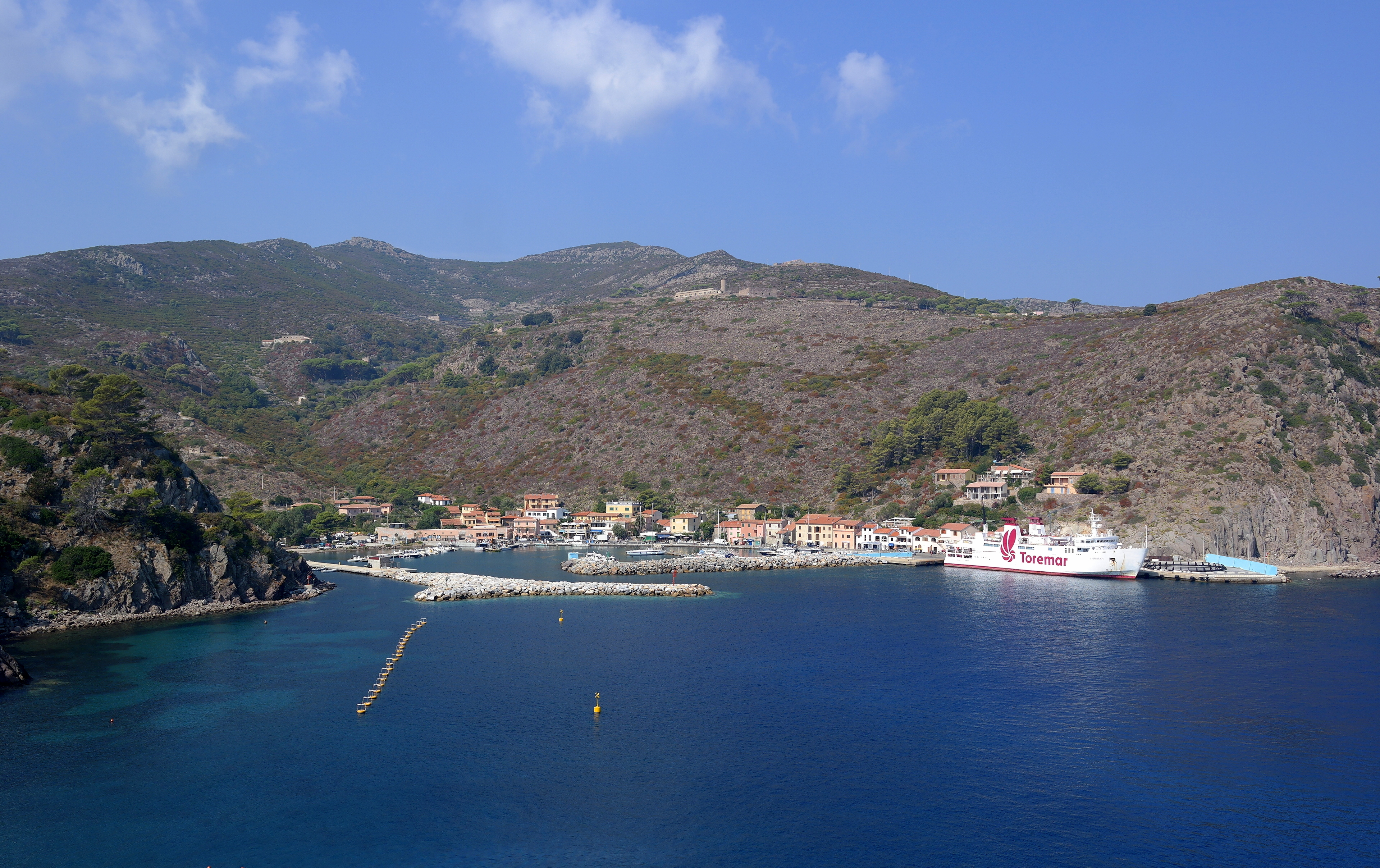 Veduta sul porticciolo dell'isola di Capraia